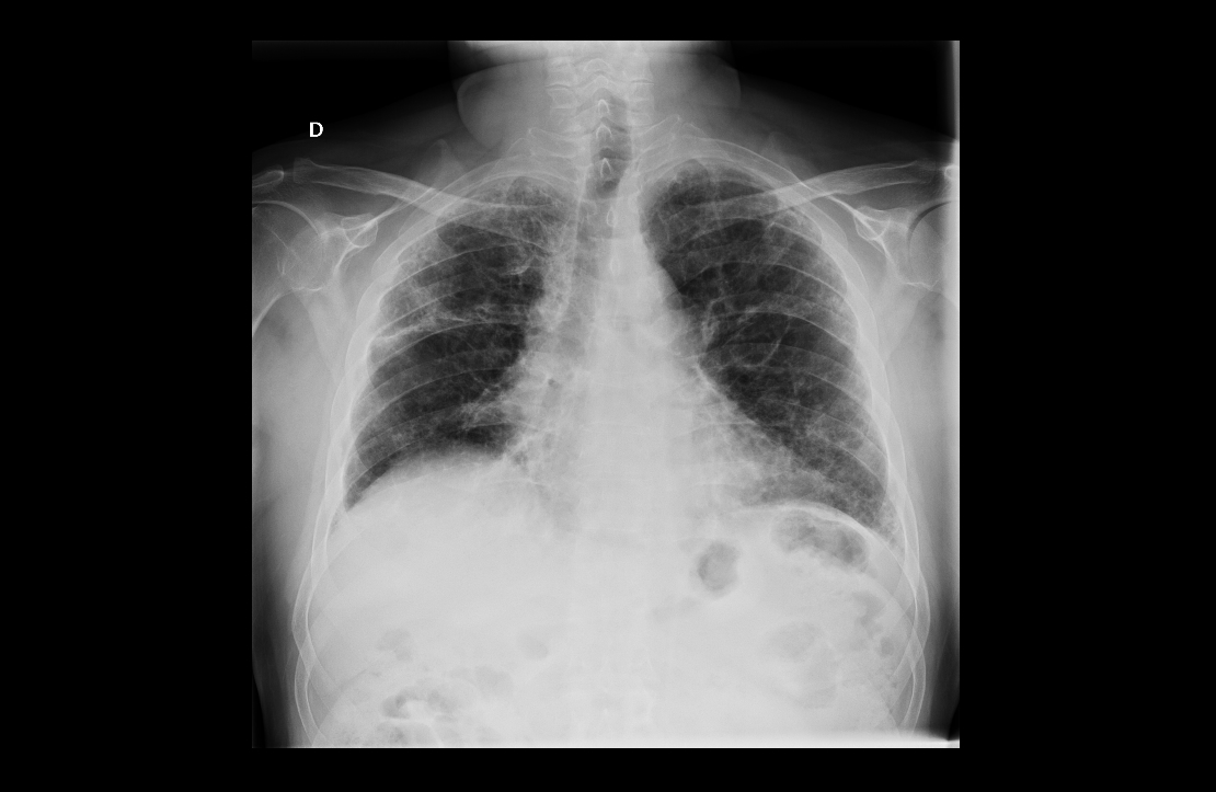 Fibrosis pulmonar en artritis reumatoide